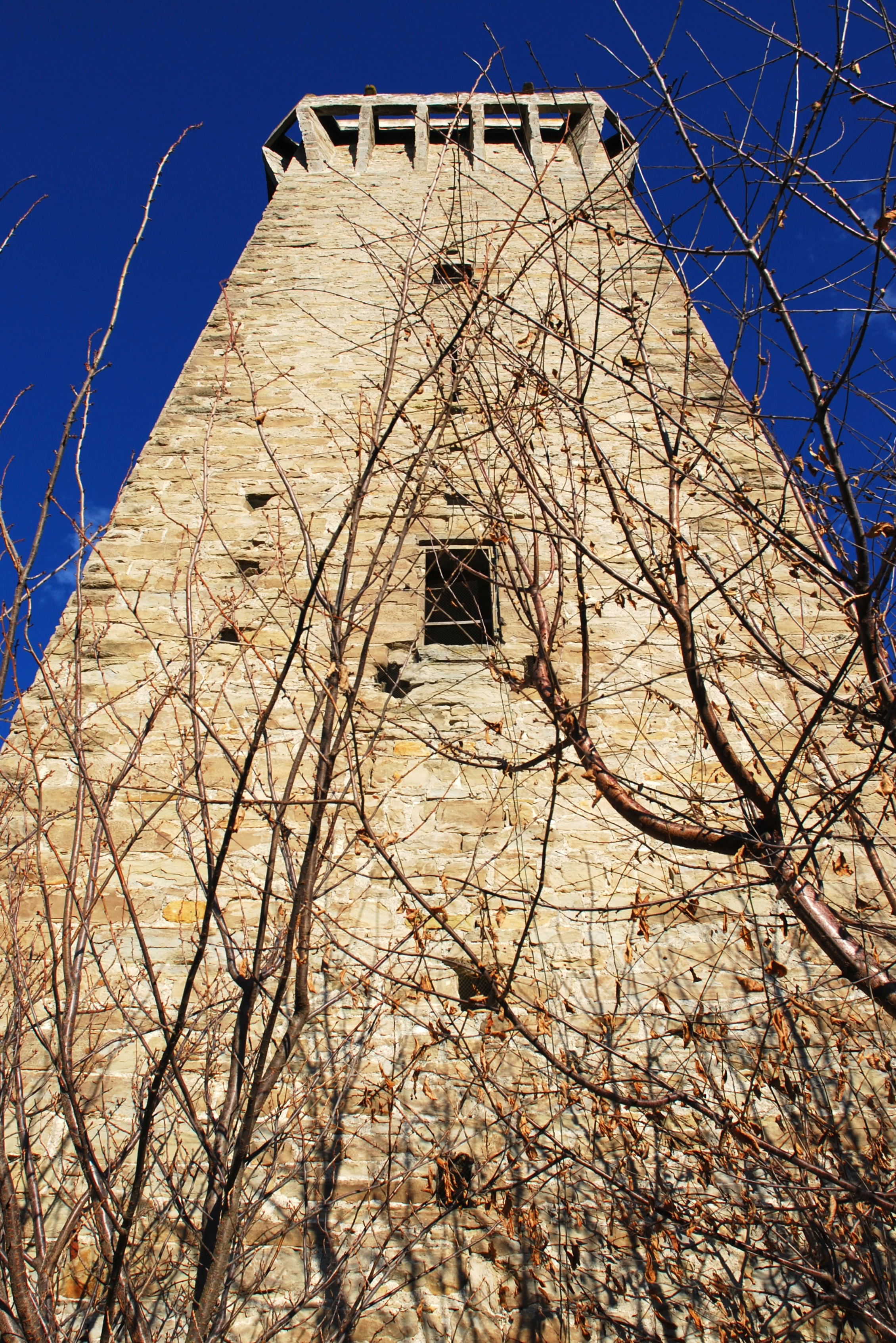 Torre che sorge nell'abitato di Perletto, provincia di Cuneo, Piemonte, Italia. Resto di un antico castello.